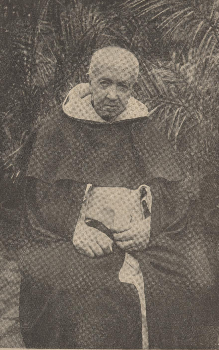 Fürst Karl VI. von Löwenstein-Wertheim-Rosenberg als Mönch